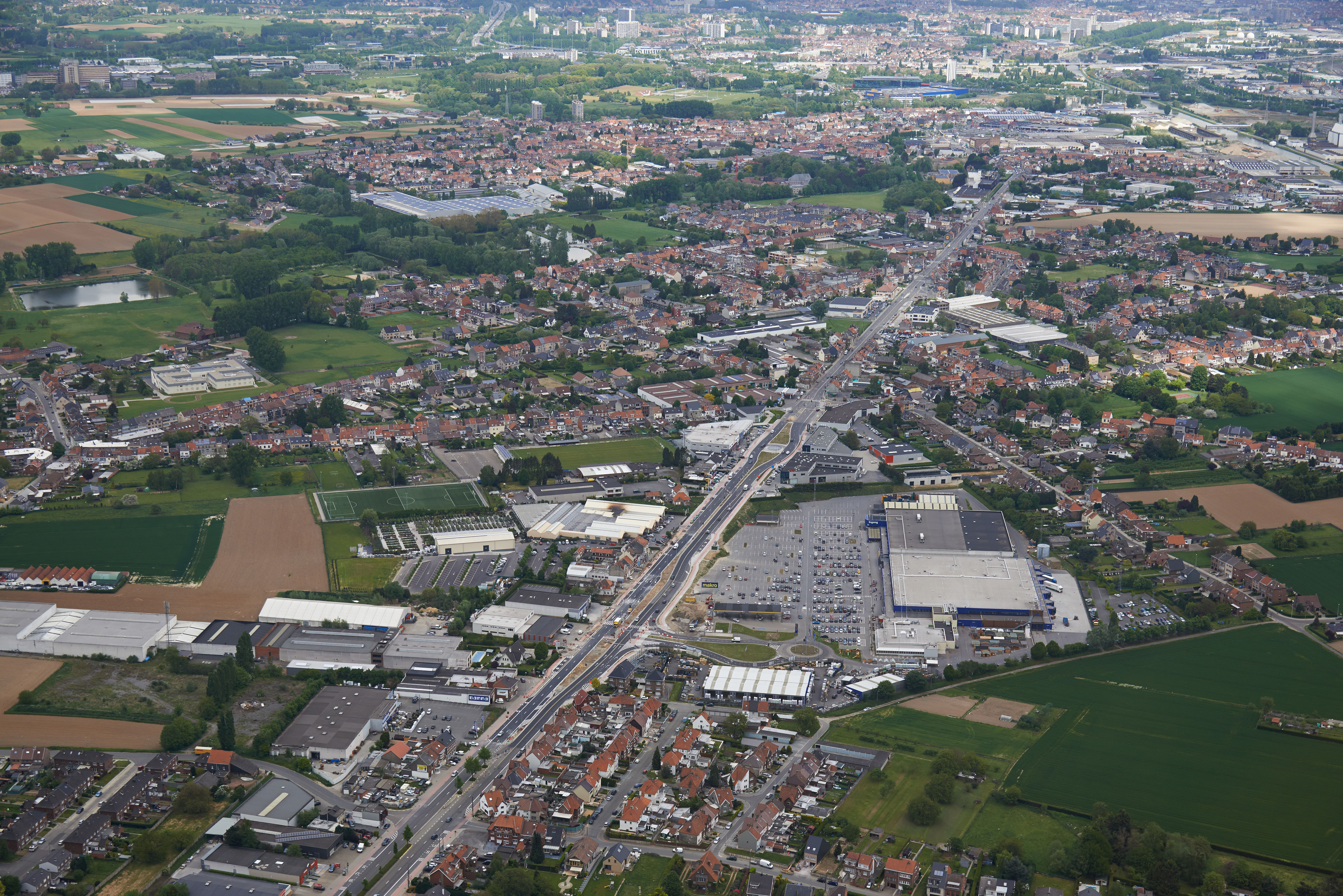 Luchtfoto van de omgeving van de Bergensesteenweg, Sint-Pieters-Leeuw, België